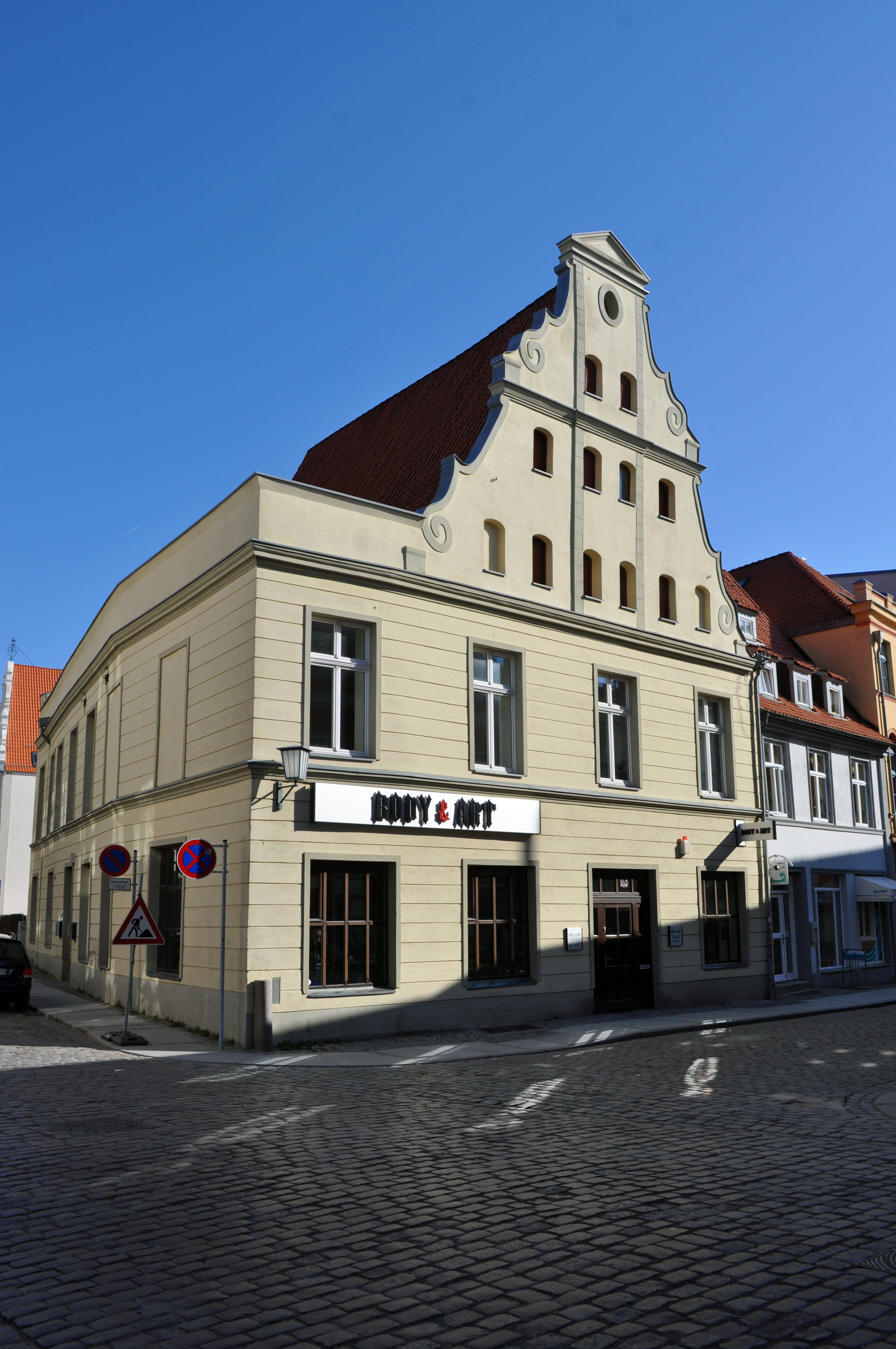 Gebäude bzw. Gebäudedetail in Stralsund. Straße und Hausnummer siehe Dateiname.